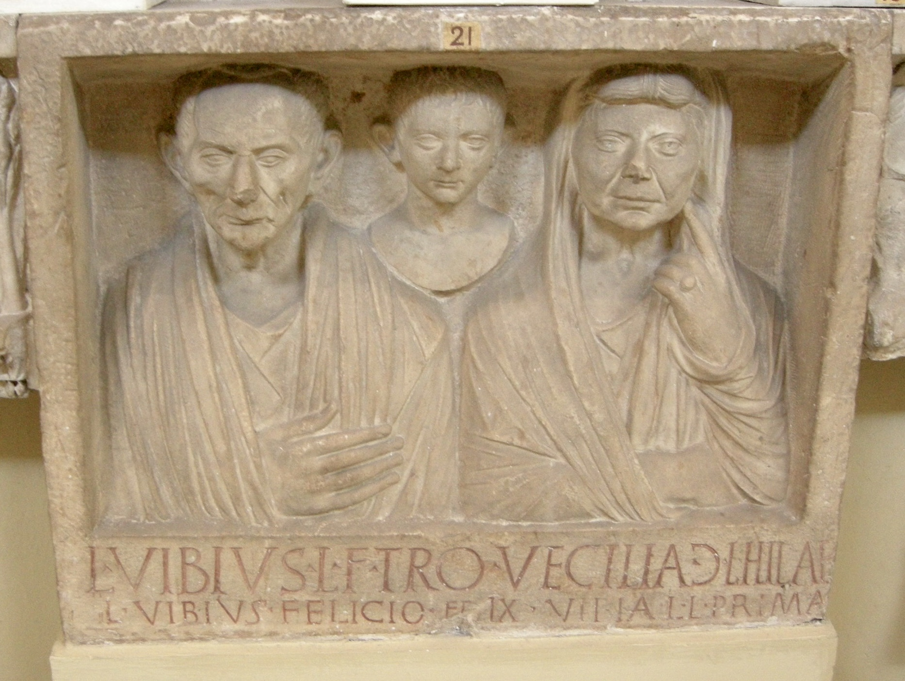 Relieve funerario romano depositado en los Museos Vaticanos, correspondiente con CIL VI 28774 = CIL XI 3843: L(ucius) Vibius L(uci) f(ilius) Tro(mentina) Vecilia )(mulieris) l(iberta) Hilara / L(ucius) Vibius Felicio Felix Vibia L(uci) l(iberta) Prima